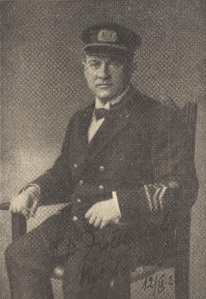 Tadeusz Ziółkowski (ur. 5 czerwca 1886 r. w Wiskitnie k. Koronowa, zm. 11 stycznia lub 22 marca 1940 r. w Stutthofie), kapitan żeglugi wielkiej, komandor pilotów portu gdańskiego, "Pierwszy żeglarz Rzeczypospolitej".